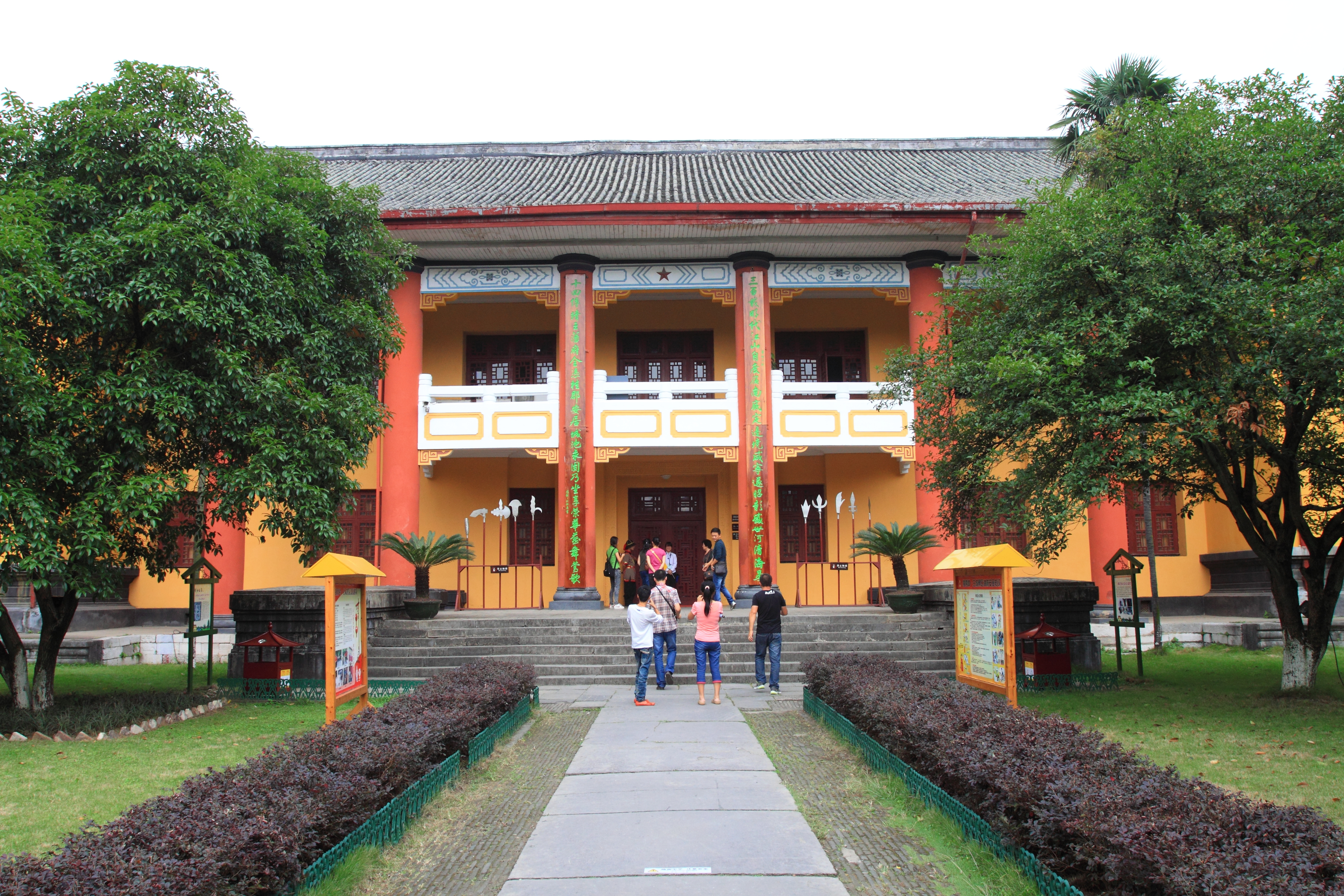 靖江王府寝宫遗址（寝宫为现代重建）